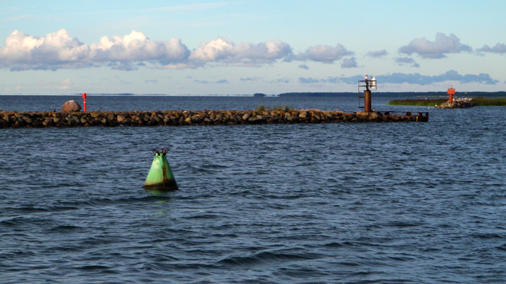 20. juuli 2013, kell 06:27 Orjaku sadam